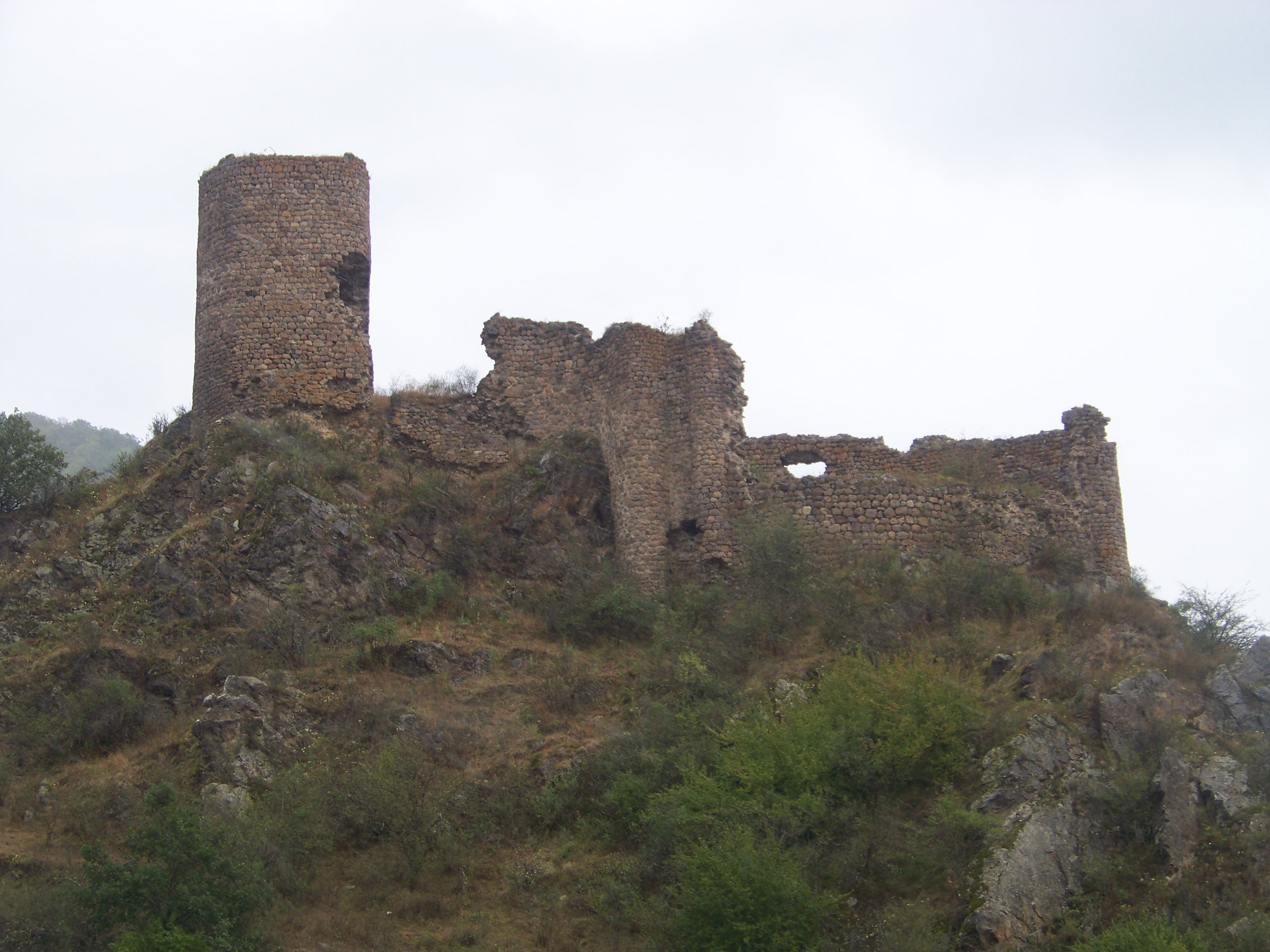 სლესის (მოქცევის) ციხე